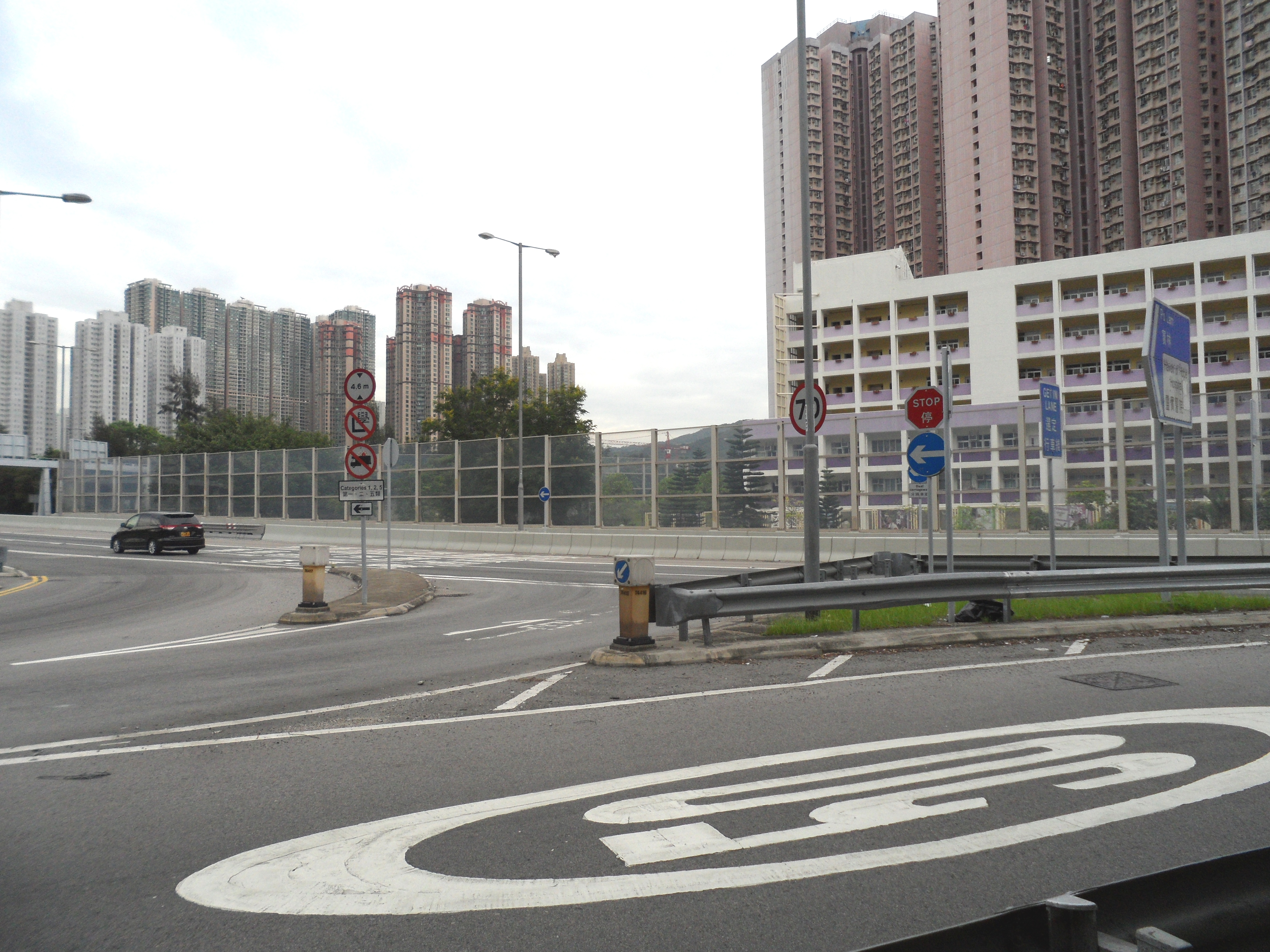 中文（香港）: 靈康路與寶順路交界。